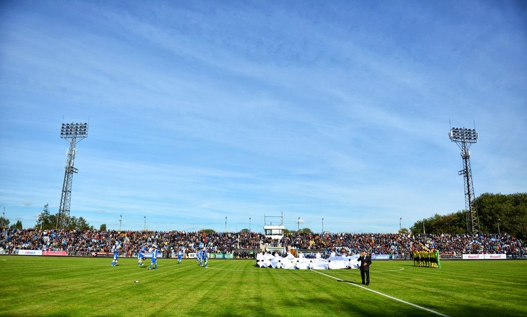 Стадион «Буковина» (город Черновцы, Украина)